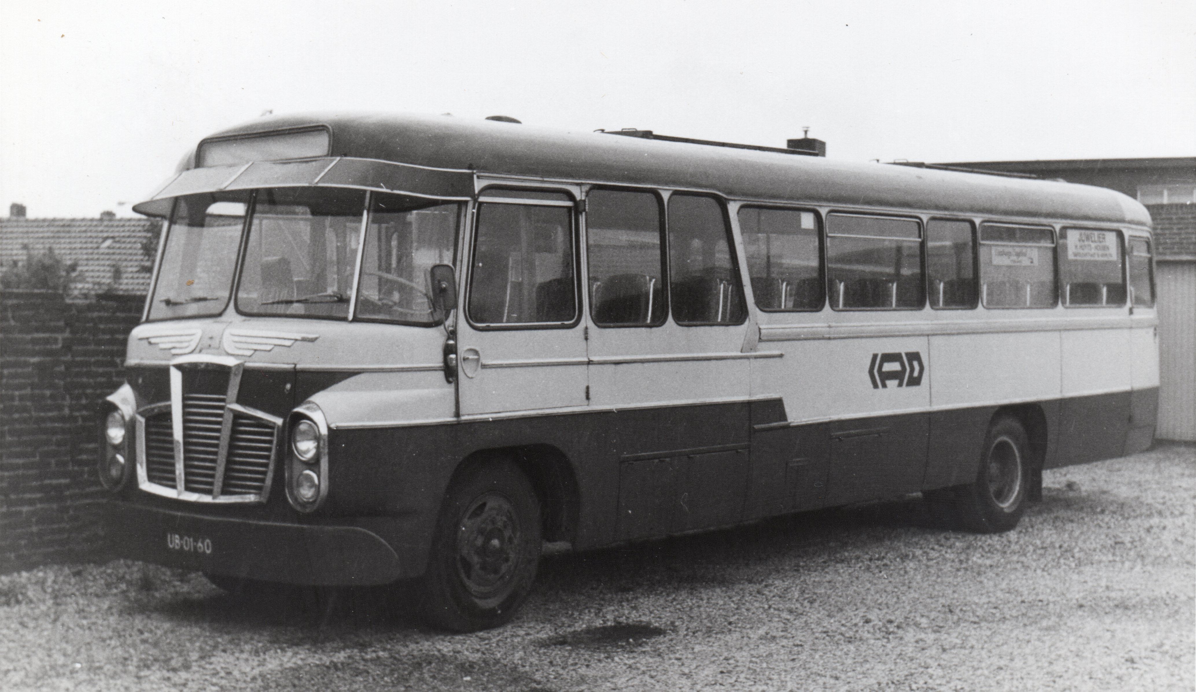 DAF-bus van de IAO, firma Van Kan te Nieuwenhagen, omstreeks 1974